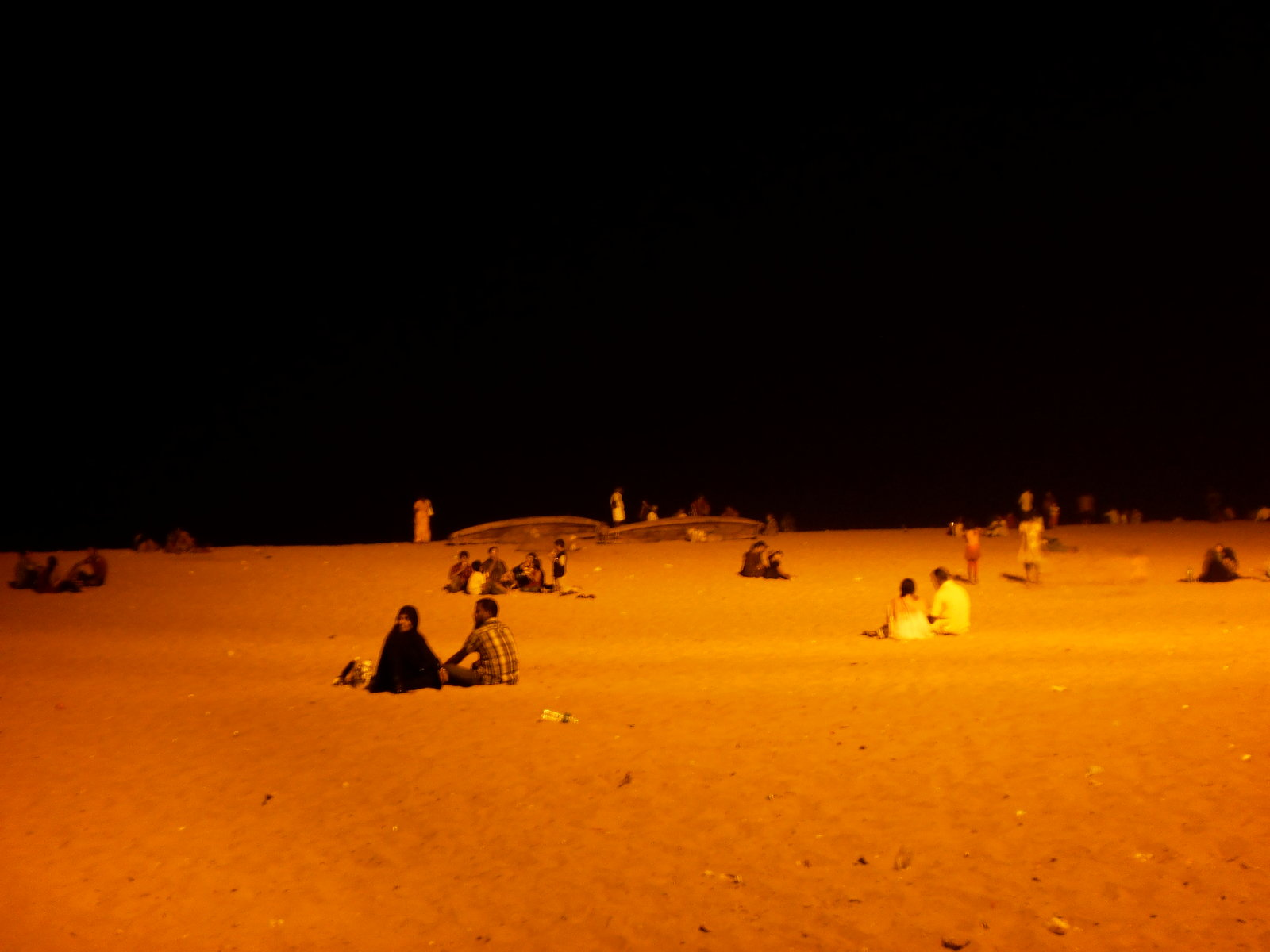 ശംഖുമുഖം കടപ്പുറം രാത്രി വീക്ഷണം